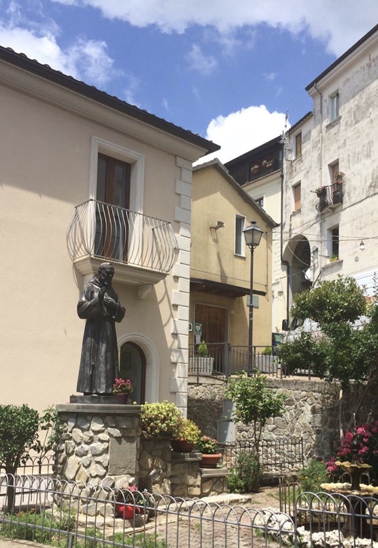 Statua